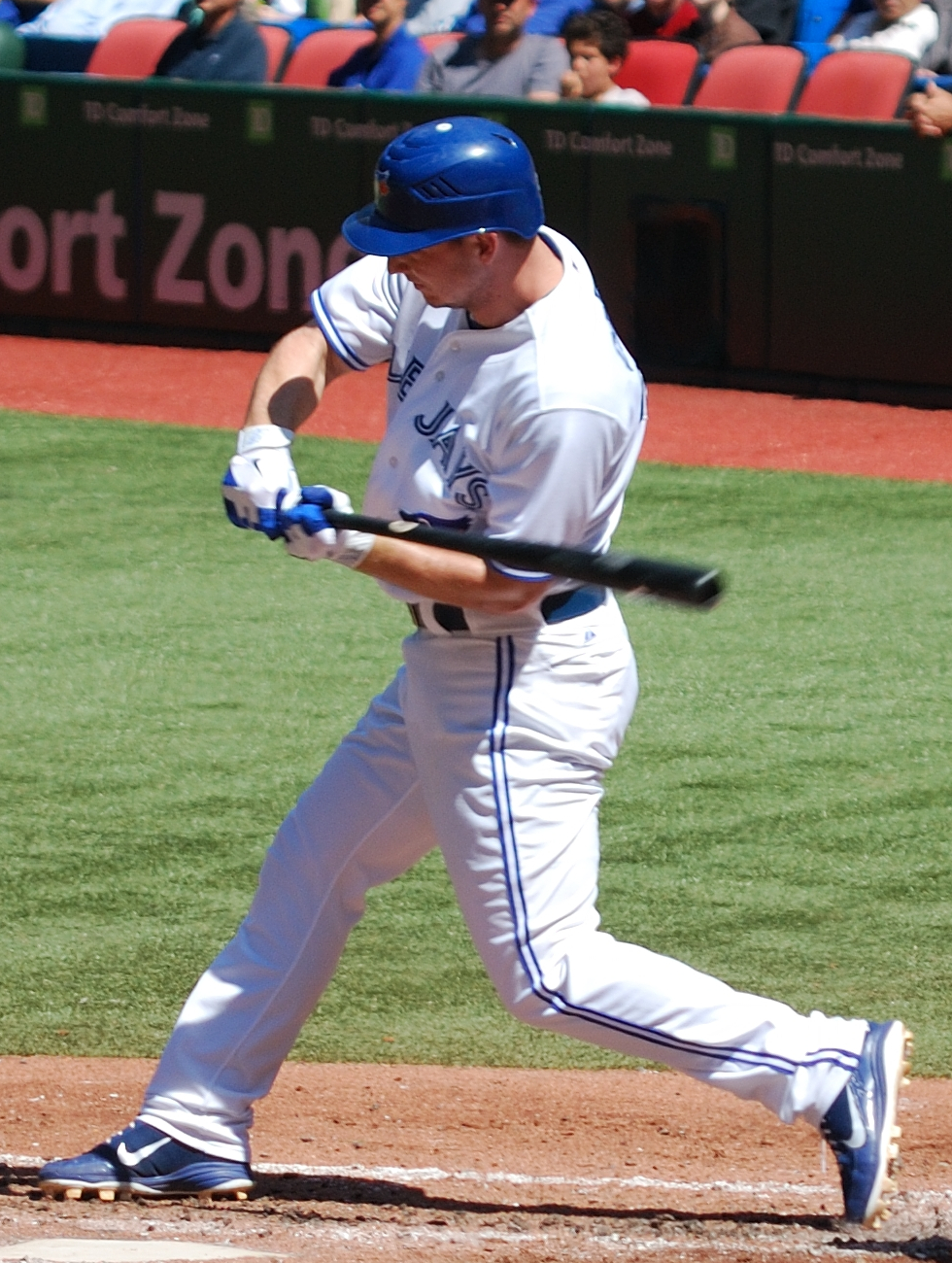 David Cooper